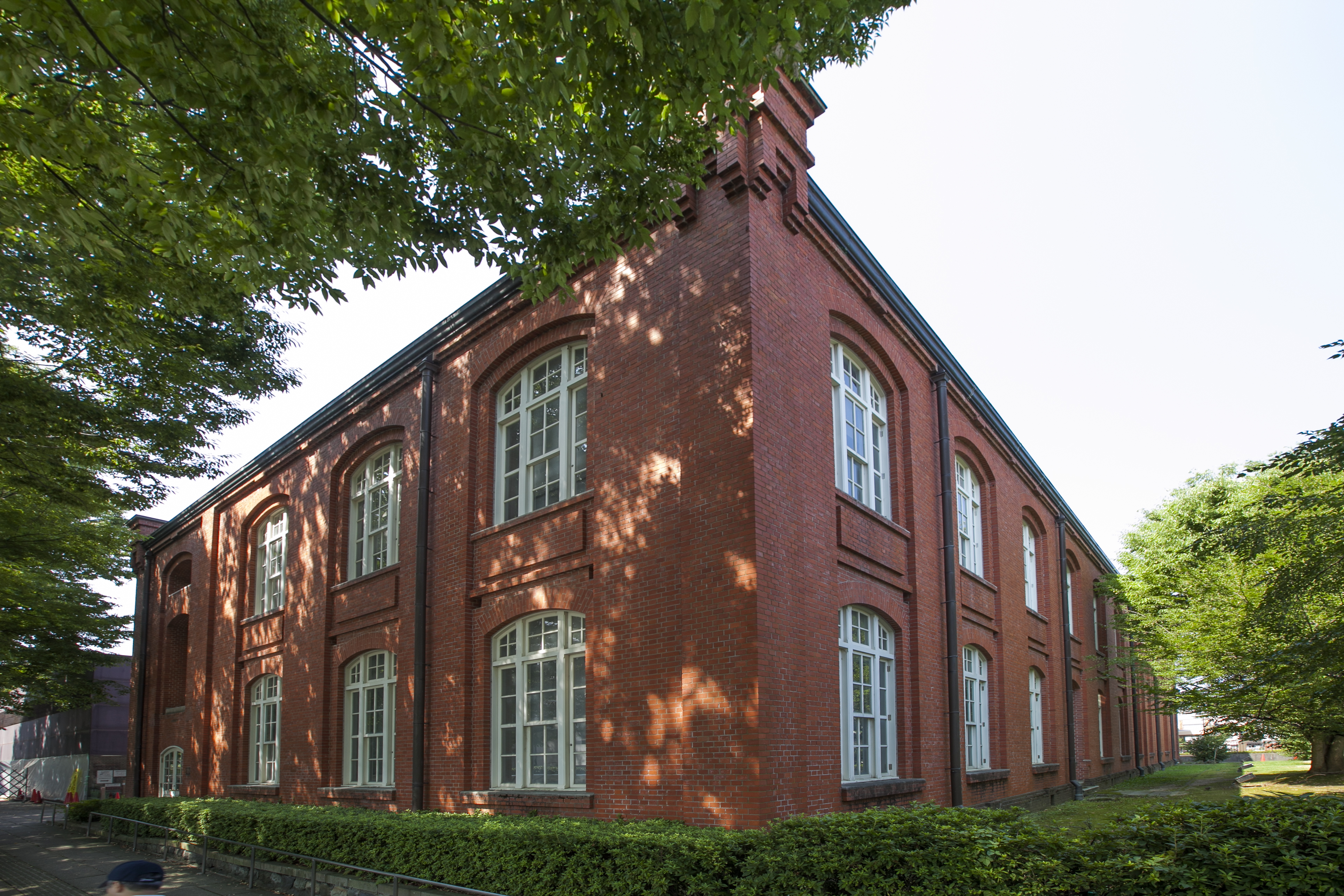 金沢市立玉川図書館